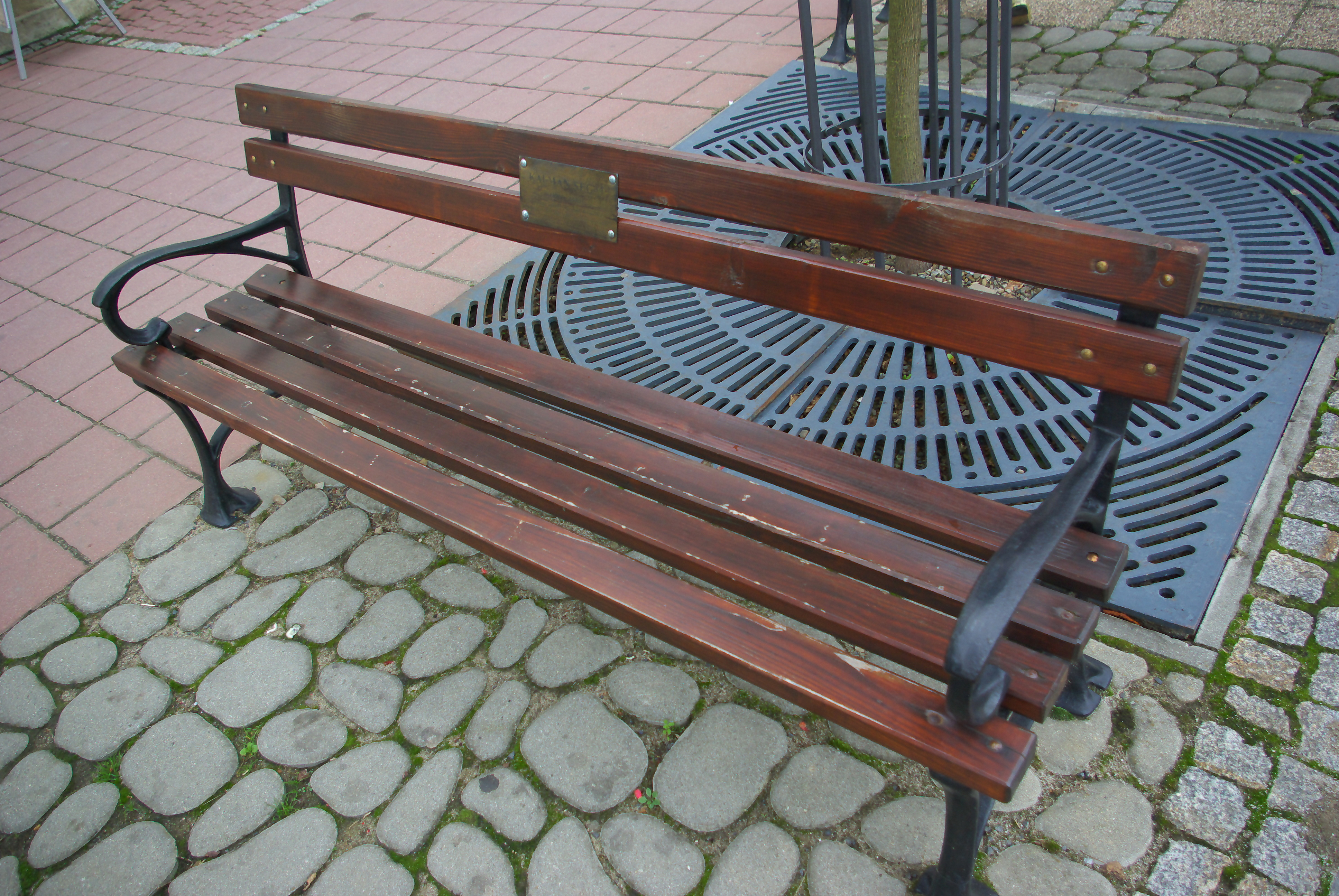 Ławka upamiętniająca Kalmana Segala na Rynku w Sanoku